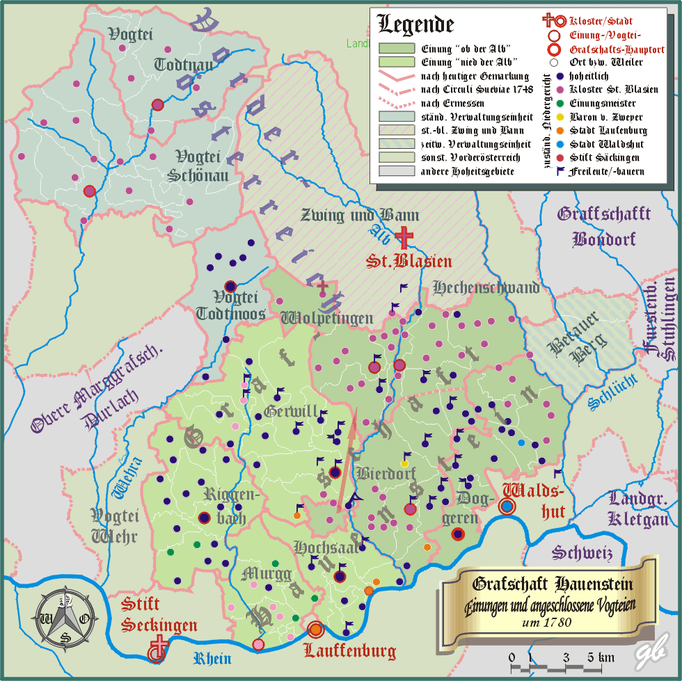 Karte der Einungen der Grafschaft Hauenstein mit den angegliederten Vogteien. Basierend auf: Alphabetische Tabelle aller in der Kameralherrschaft der Grafschaft Hauenstein waldvogteiamtlichen Bezirks befindliche Ortschaften von 1783 (Generallandesarchiv Karlsruhe) und Curculi Sueviae - historische Karte von 1748. Die Namen und Bezeichnungen entprechen der historischen Schreibweise.